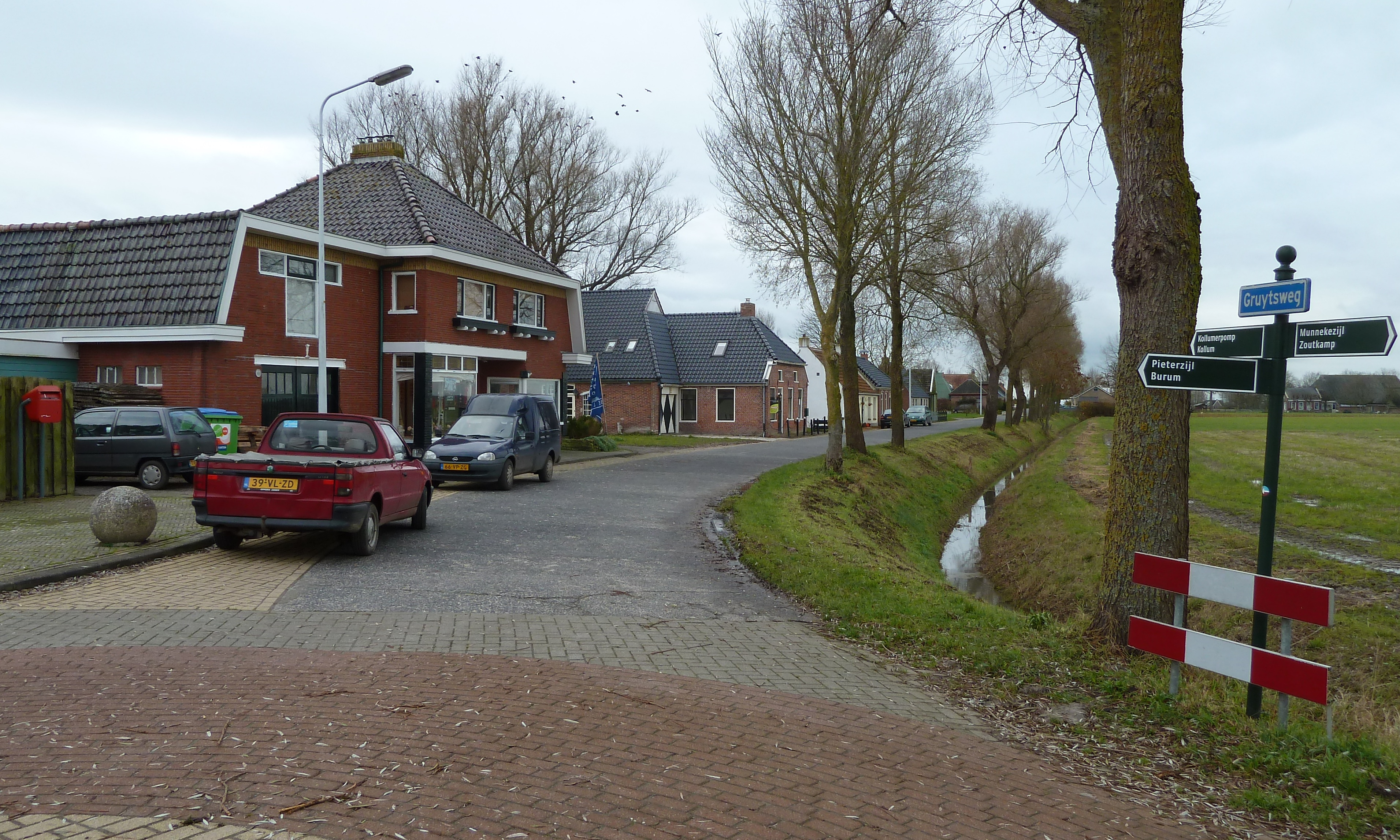 Huizen aan de Gruytsweg in Warfstermolen, gezien vanaf de driesprong met De Warf.